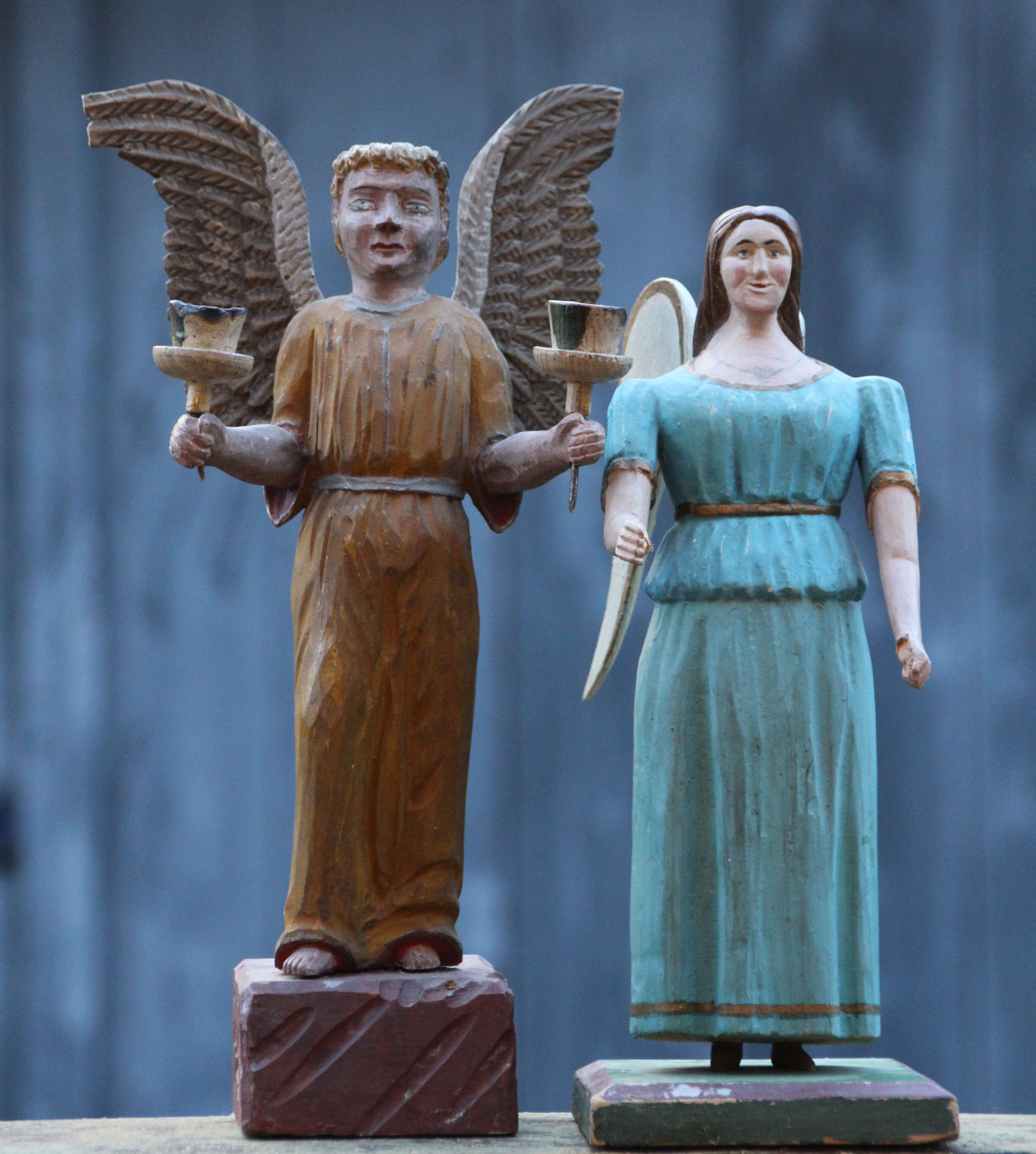 Lichterengel: „Beinengel“ werden im Erzgebirge (dort in Erzgebirgisch Baaengel) die lichtertragenden Engel genannt, bei denen der Rock nicht bis zum Sockel reicht, auf dem sie stehen, sondern die Füße und ein Teil des Beins zu sehen sind. Die Herstellung bei gedrechselten Figuren ist aufwändiger, da nicht der ganze Rumpf durch Holzdrechseln hergestellt werden kann, sondern der untere Teil des Körpers geschnitzt werden muss. Hier geschnitzte Engelfiguren, die zu datieren sind auf die Zeitspanne von Anfang bis Mitte des 20. Jahrhunderts, möglicherweise entstanden sie schon ausgangs des 19. Jahrhunderts. Sie gehören zur Sammlung DS.